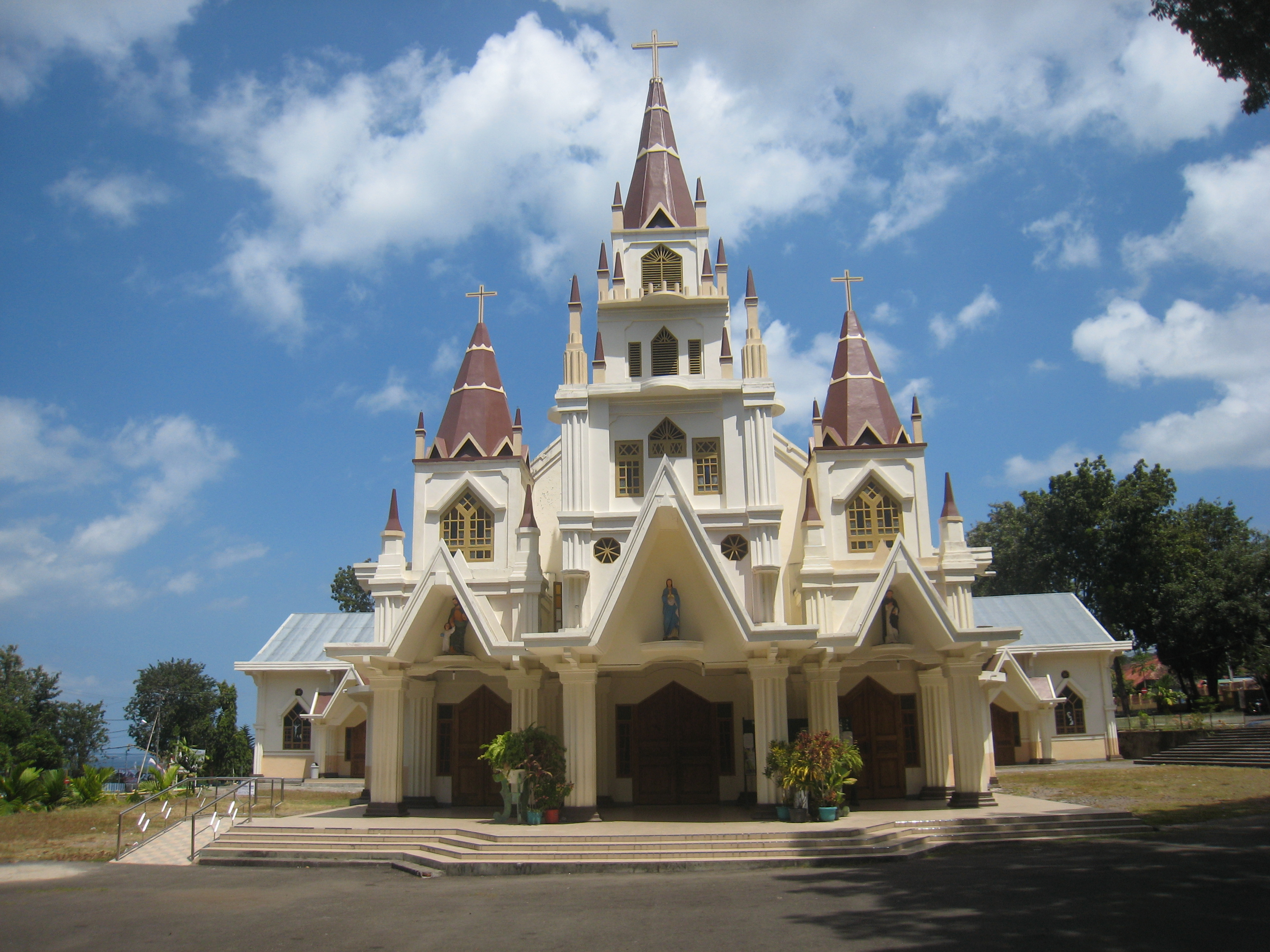 Cattedrale di Larantuka